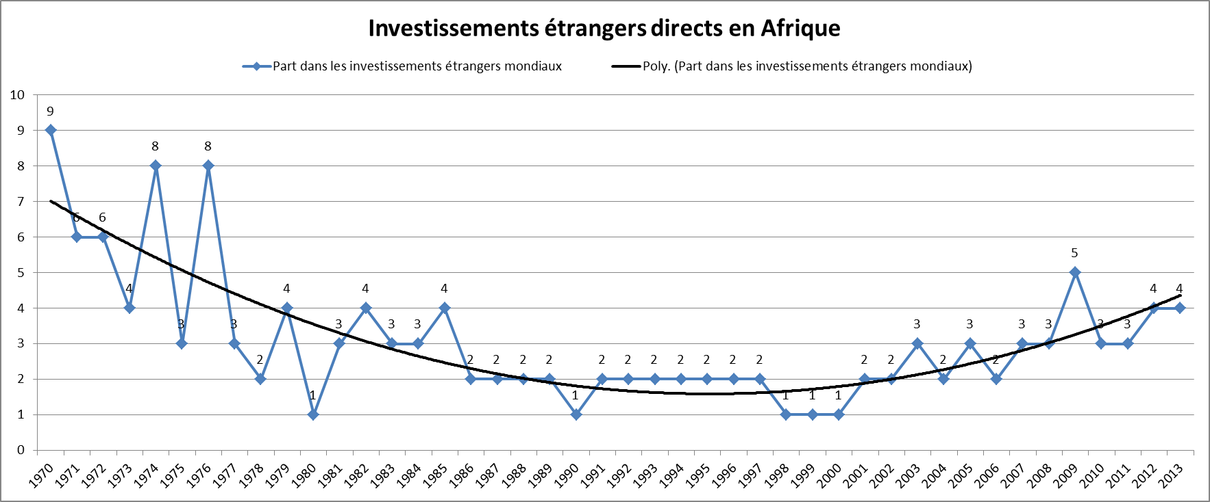 Investissements étrangers en Afrique, en % des investissements mondiaux, 1970-2013